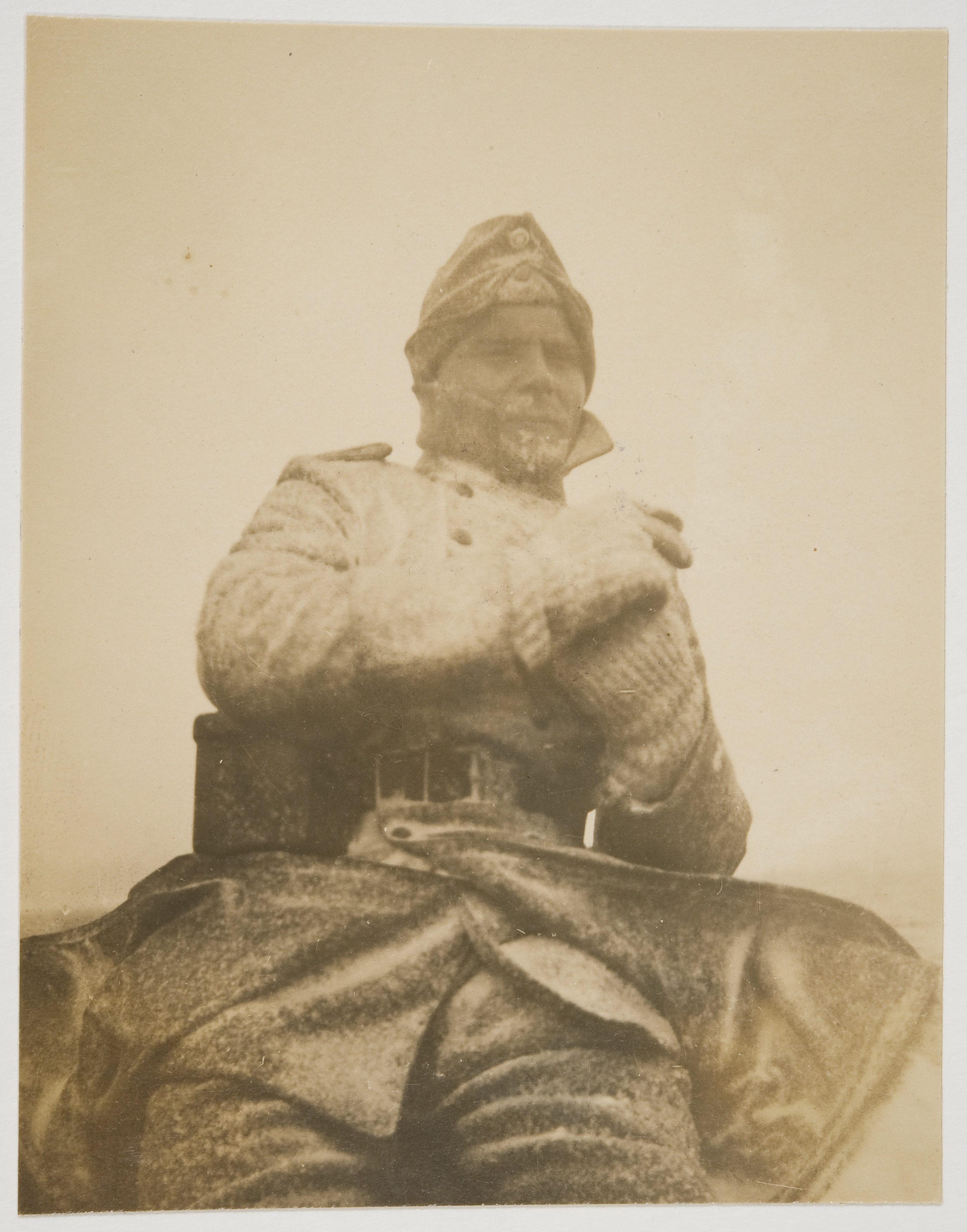 Petsamon retkellä mukana ollut kapteeni Eino Järvinen lumimyrskyn kourissa Pohjanmaan Jääkäripataljoonan suorittama kolmas Petsamon retki kesti 3.3.-17.7.1920